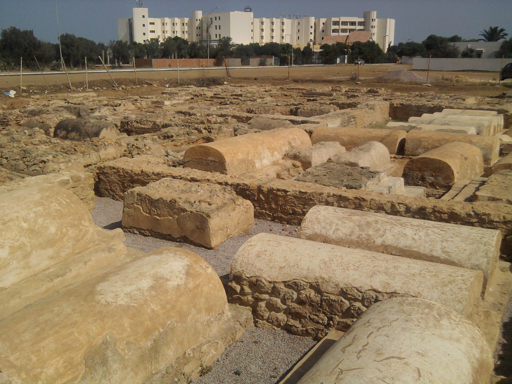 Tunisie, Site archéologique de Hammamet, catacombes